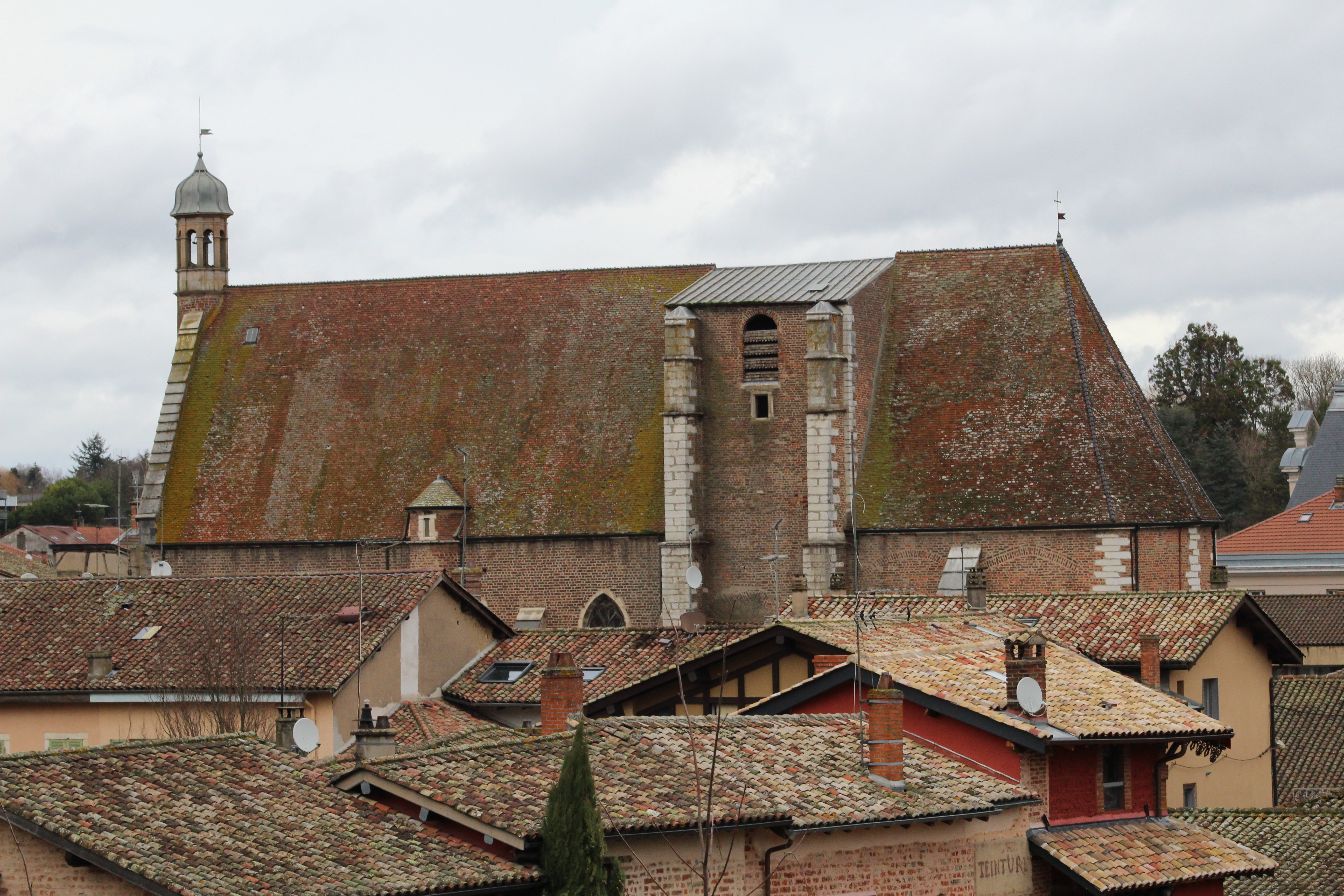 Église Saint-André-et-Saint-Vincent-de-Paul de Châtillon-sur-Chalaronne.